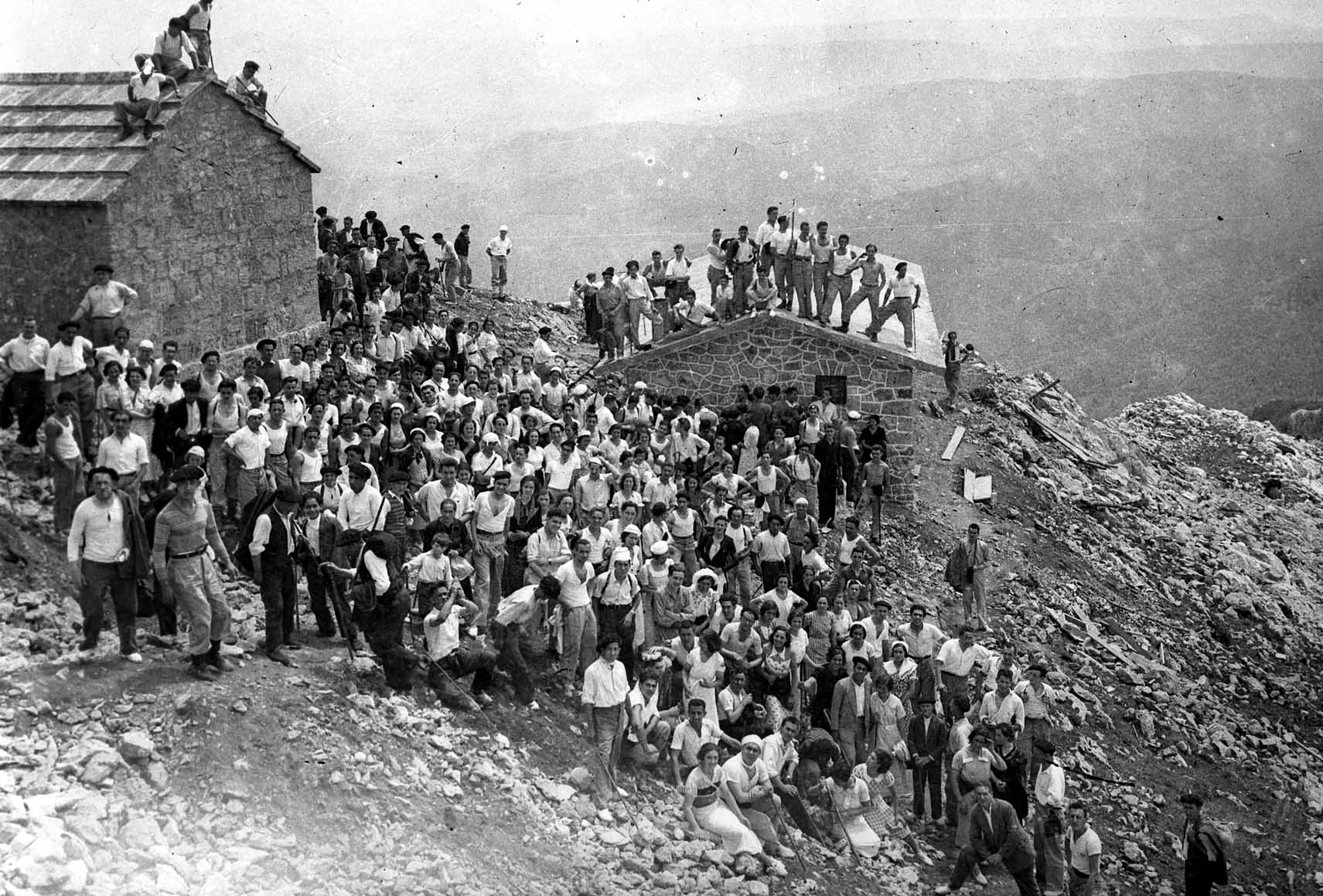 Aizkorriko gailurra 1934ko uztailaren 8an. Mendizaleen refugioa inauguratu zenekoa.